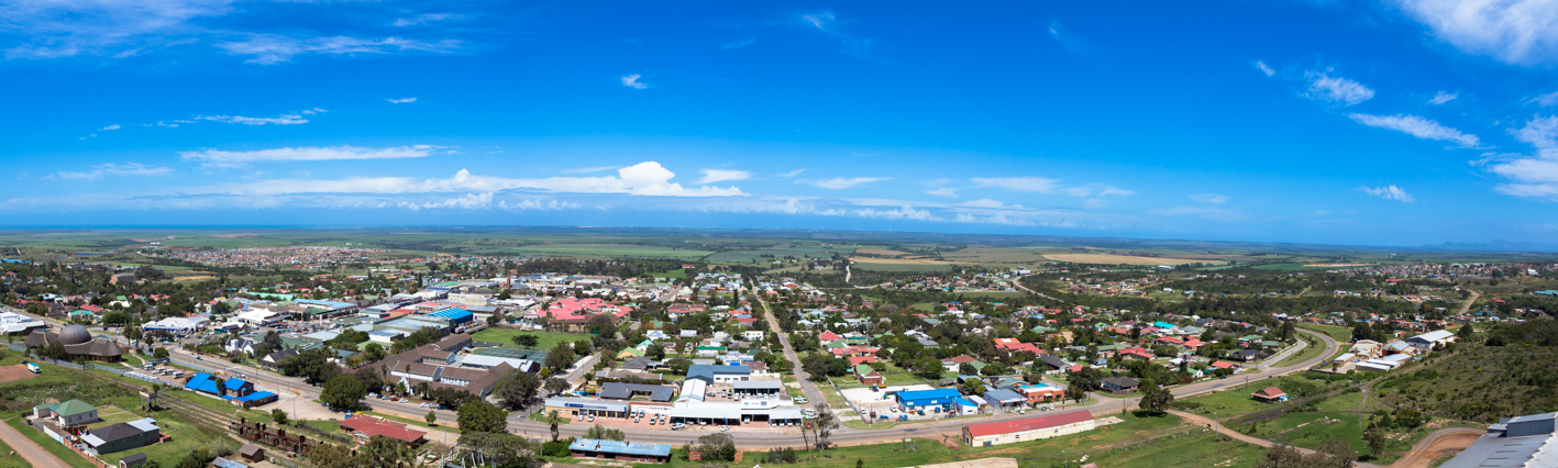 Humansdorp